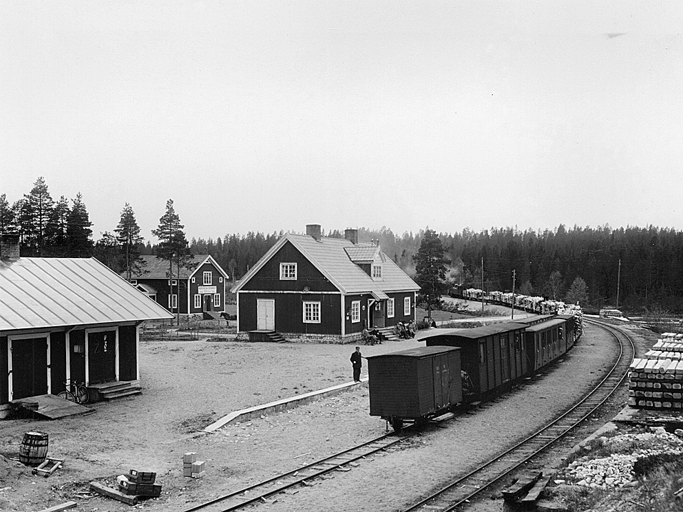 Nittkvarns station vid Säfsnäs Järnväg. Bildnr: SEVA_BAB67_03 Arkivbildare: Billerud AB Originalbeskrivning: Nittkvarns järnvägsstation å S V J 33 km från Annefors.